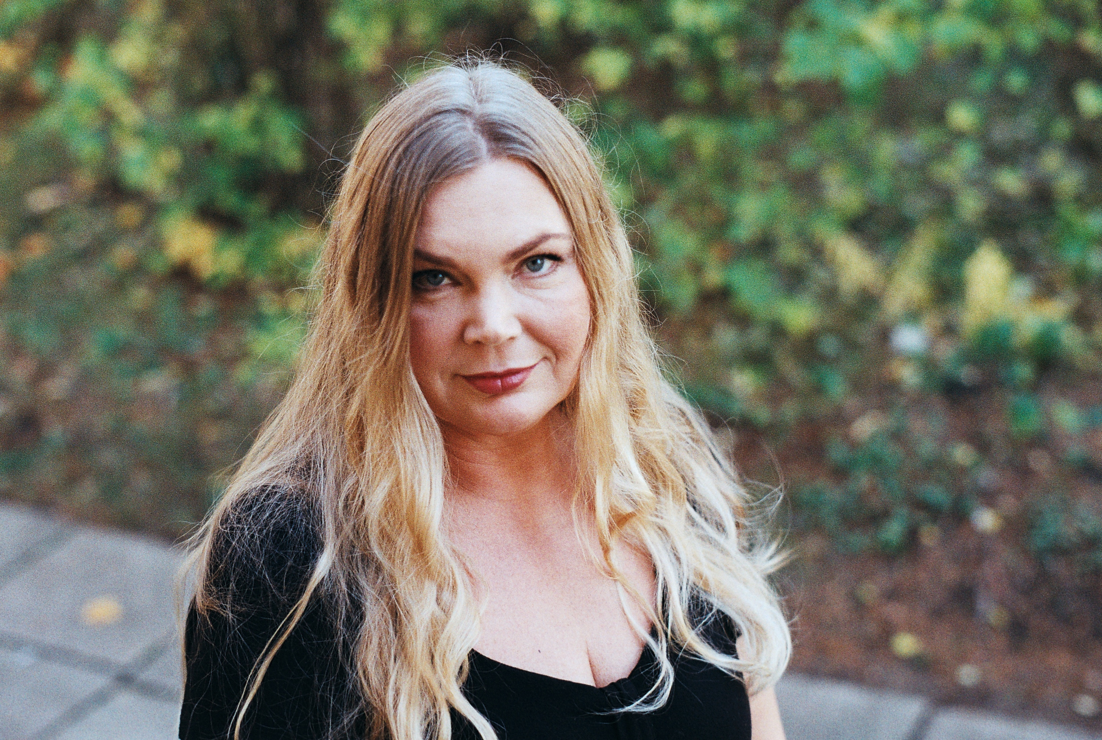 Foto: Madli Lippur